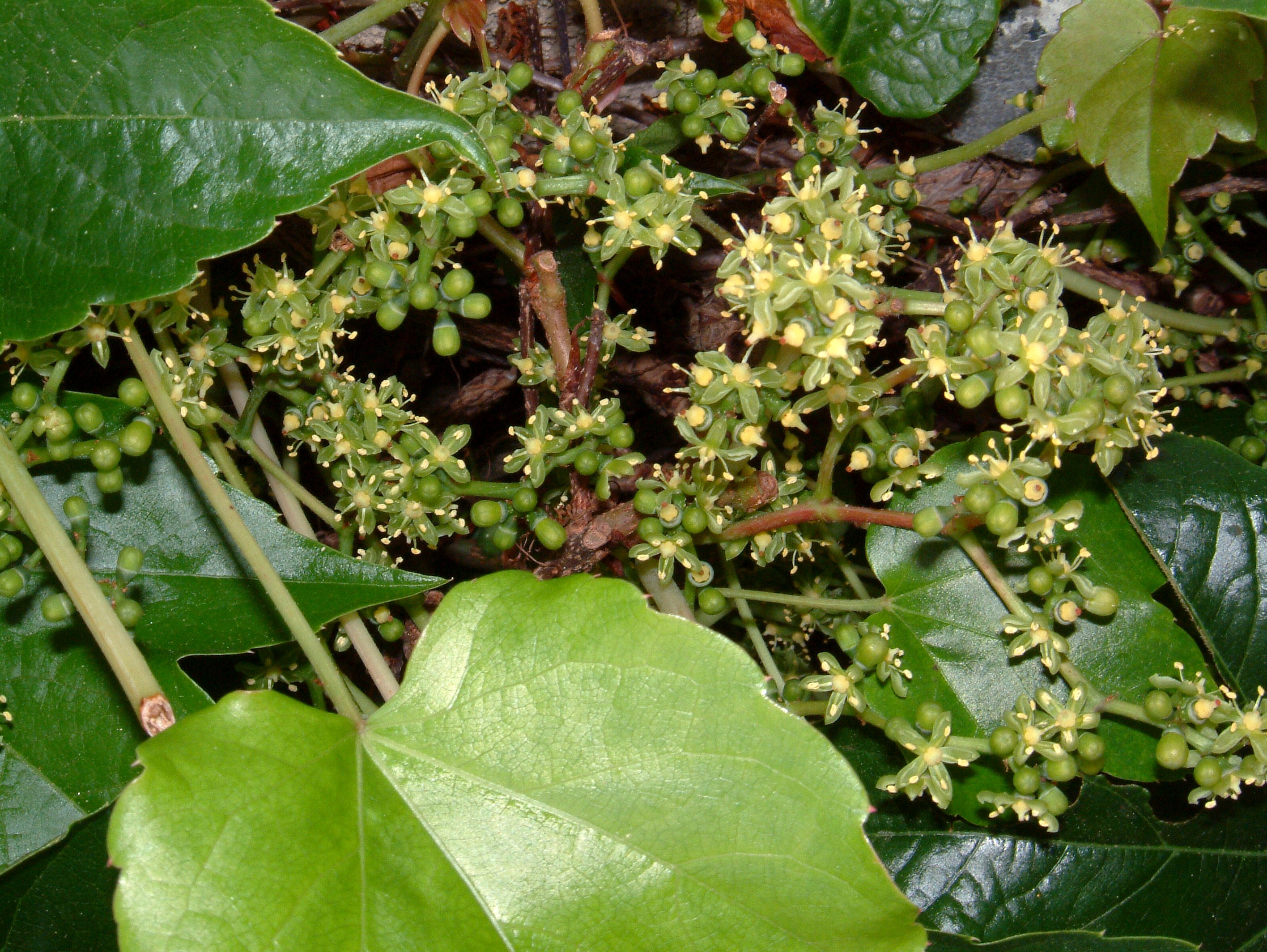 Parthenocissus tricuspidata - Dreispitzige Jungfernrebe - Wilder Wein 2 August 2007